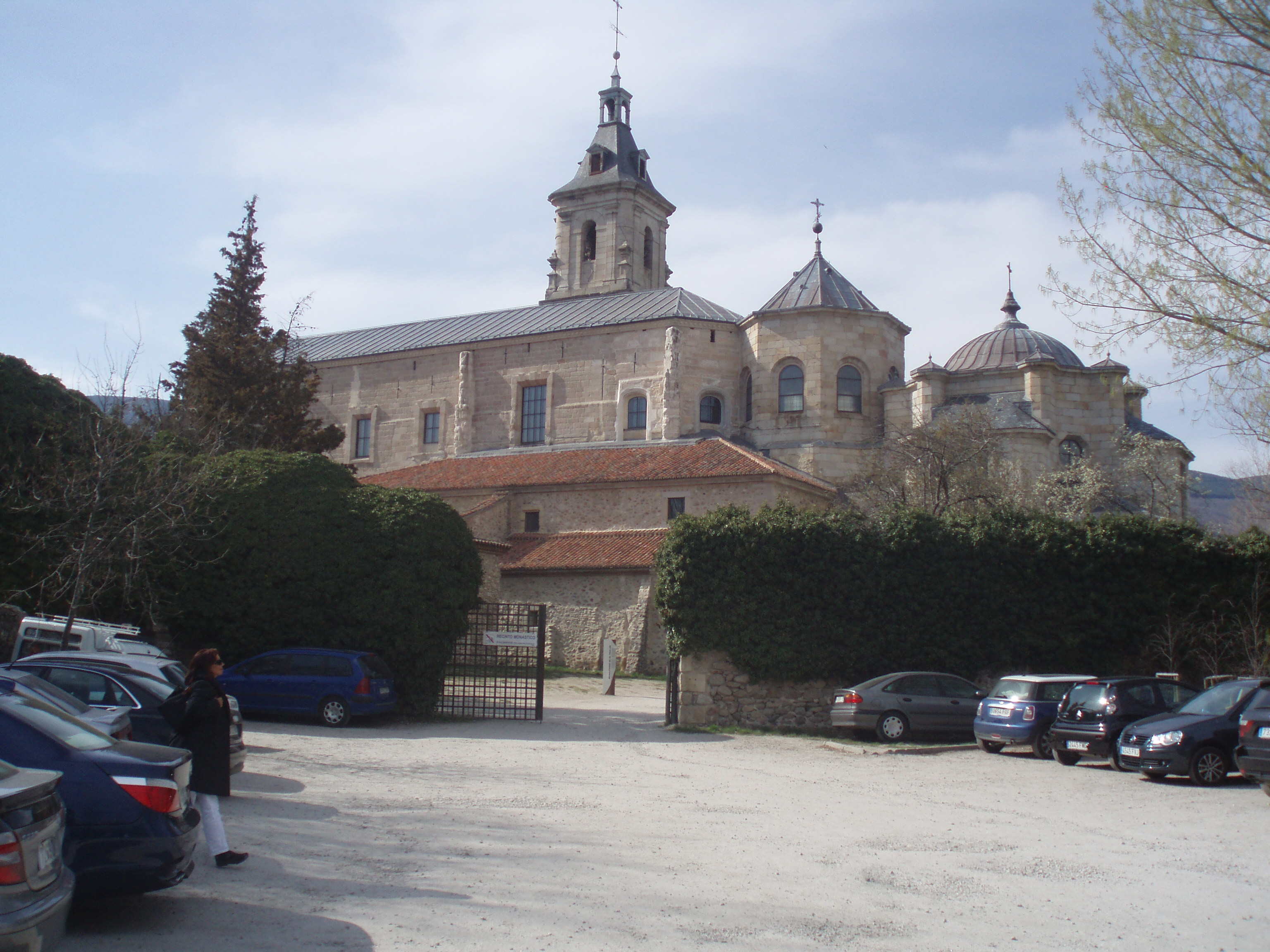 Monasterio de El Paular desde la entrada (Sierra de Guadarrama, España).